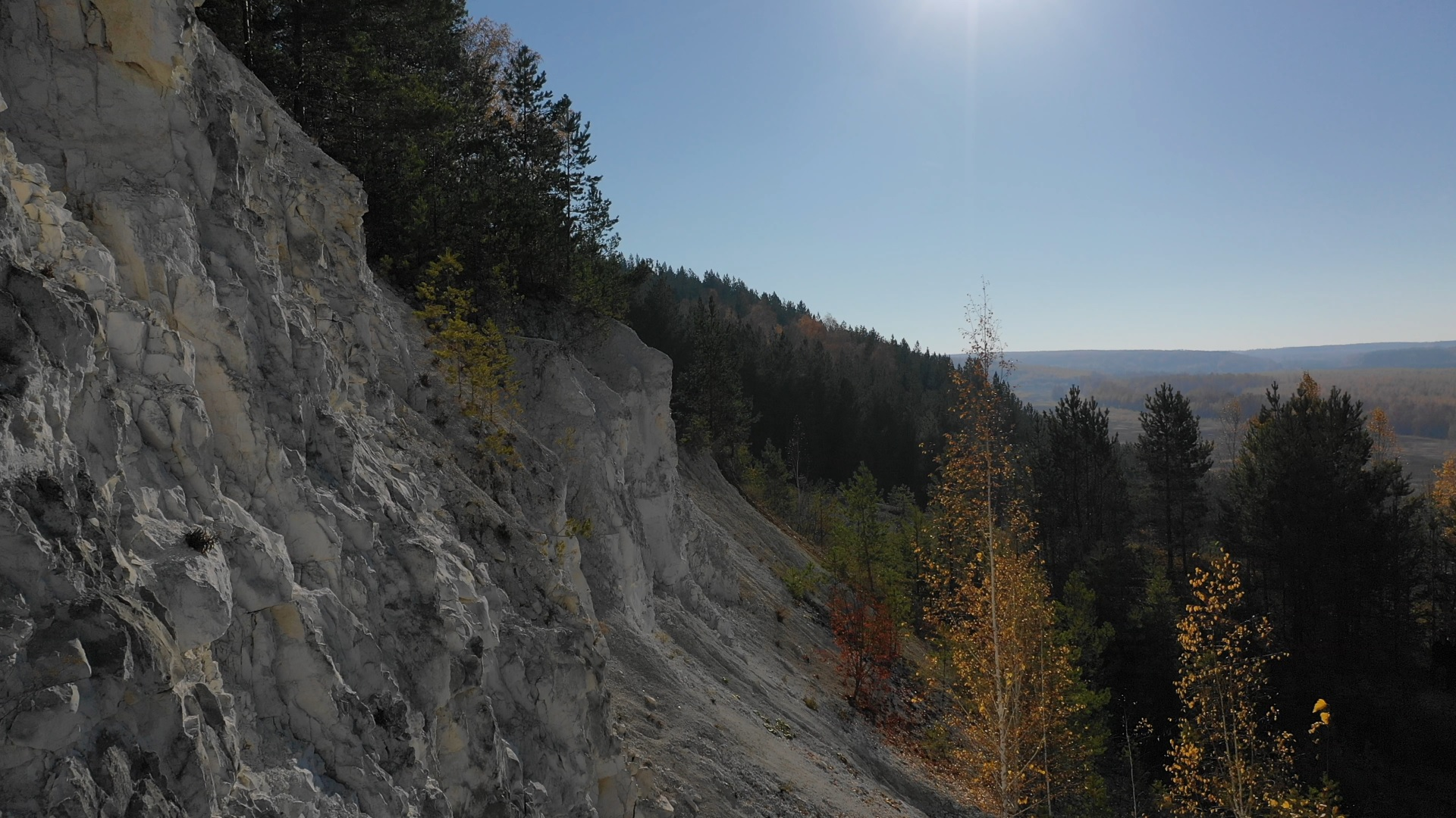 Возвышенность